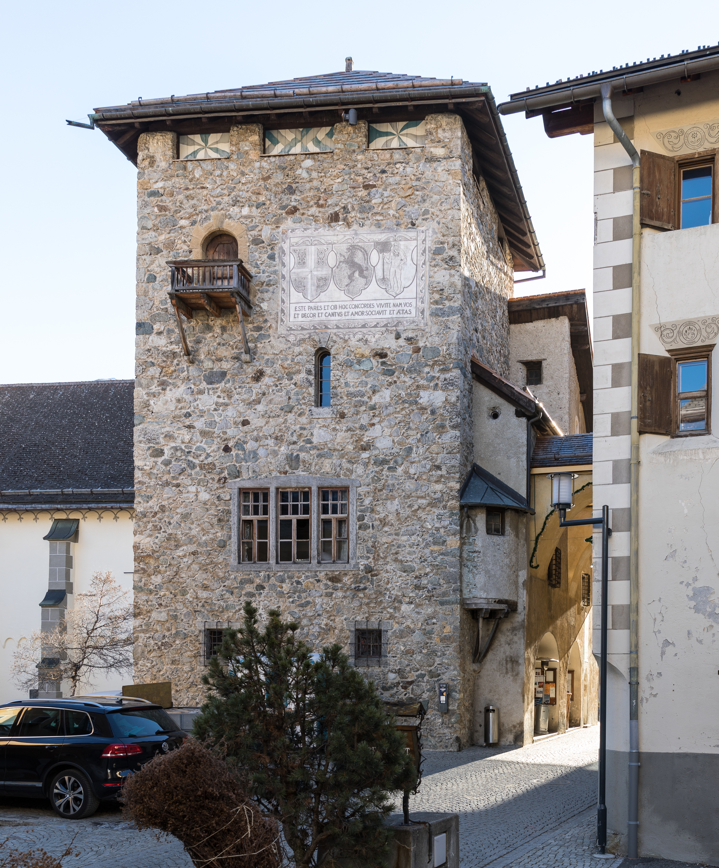 Tuor Planta / Plantaturm in Zuoz GR/Schweiz